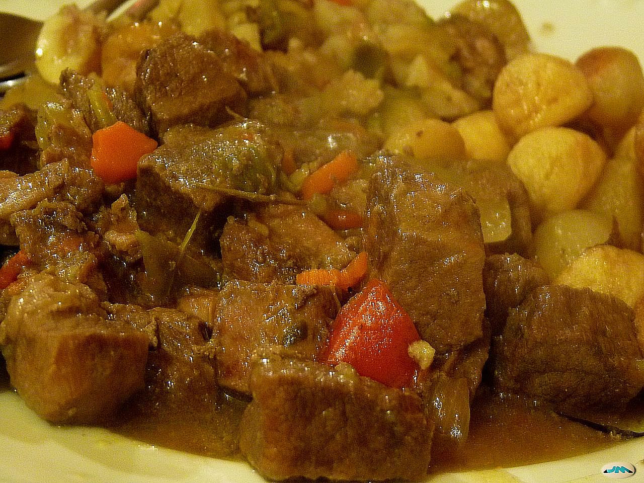 Ragoût de sanglier aux châtaignes